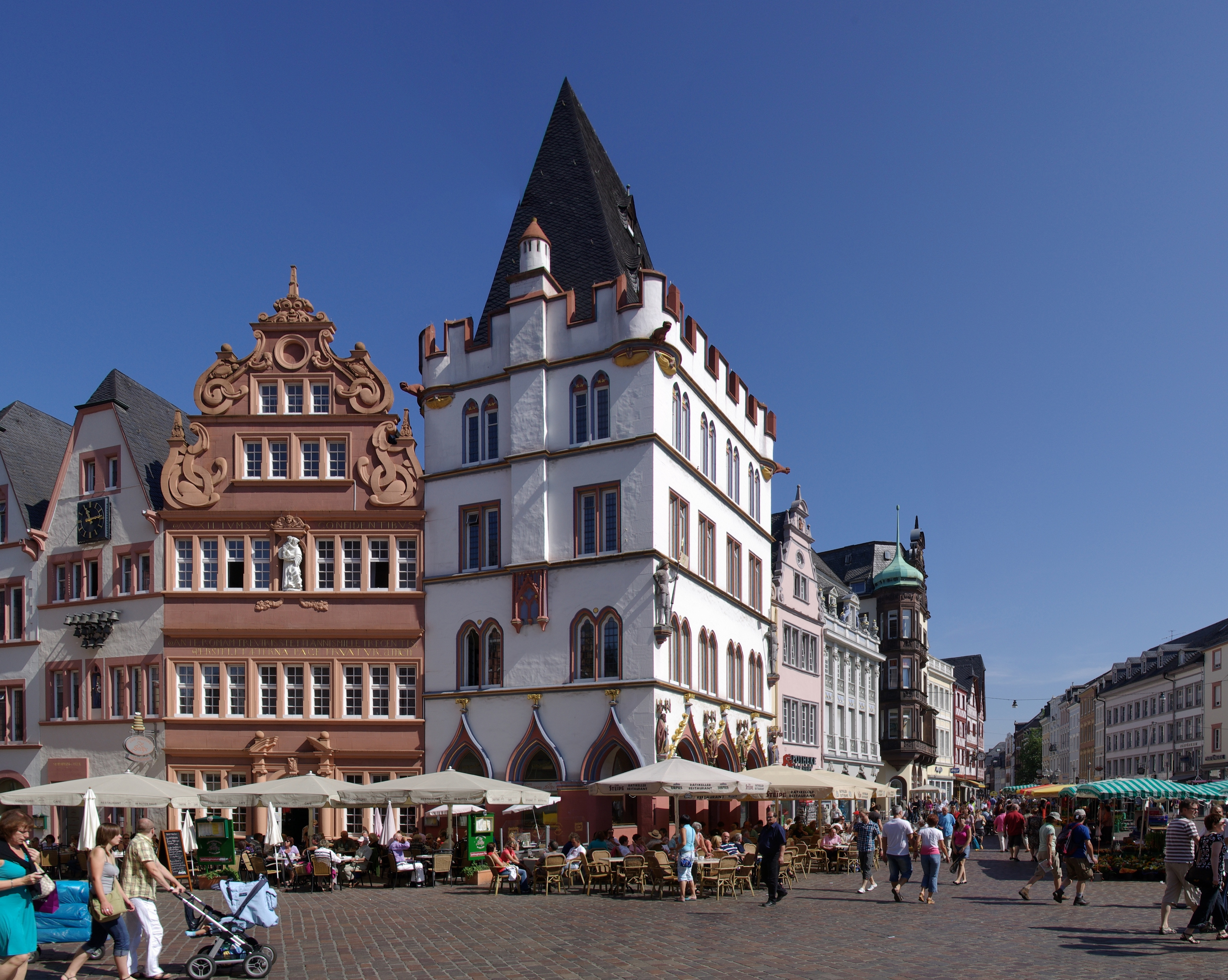 Trier, Steipe (Mitte), gebaut um 1430, 1481-83 umgebaut, im 2. Weltkrieg zerstört, von 1968-70 wiederaufgebaut, Skulpturen von Meister "Steffen Bildhauer" (die Originale befinden sich im Städischen Museum); "Rotes Haus" (links davon), repräsentativer Spätrenaissancebau, Volutengiebel, Nischenfigur, gebaut 1684, ebenfalls zerstört und wiederaufgebaut